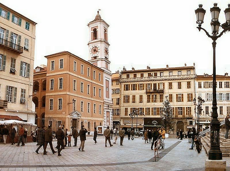 Nice-VieilleVille Place du Palais